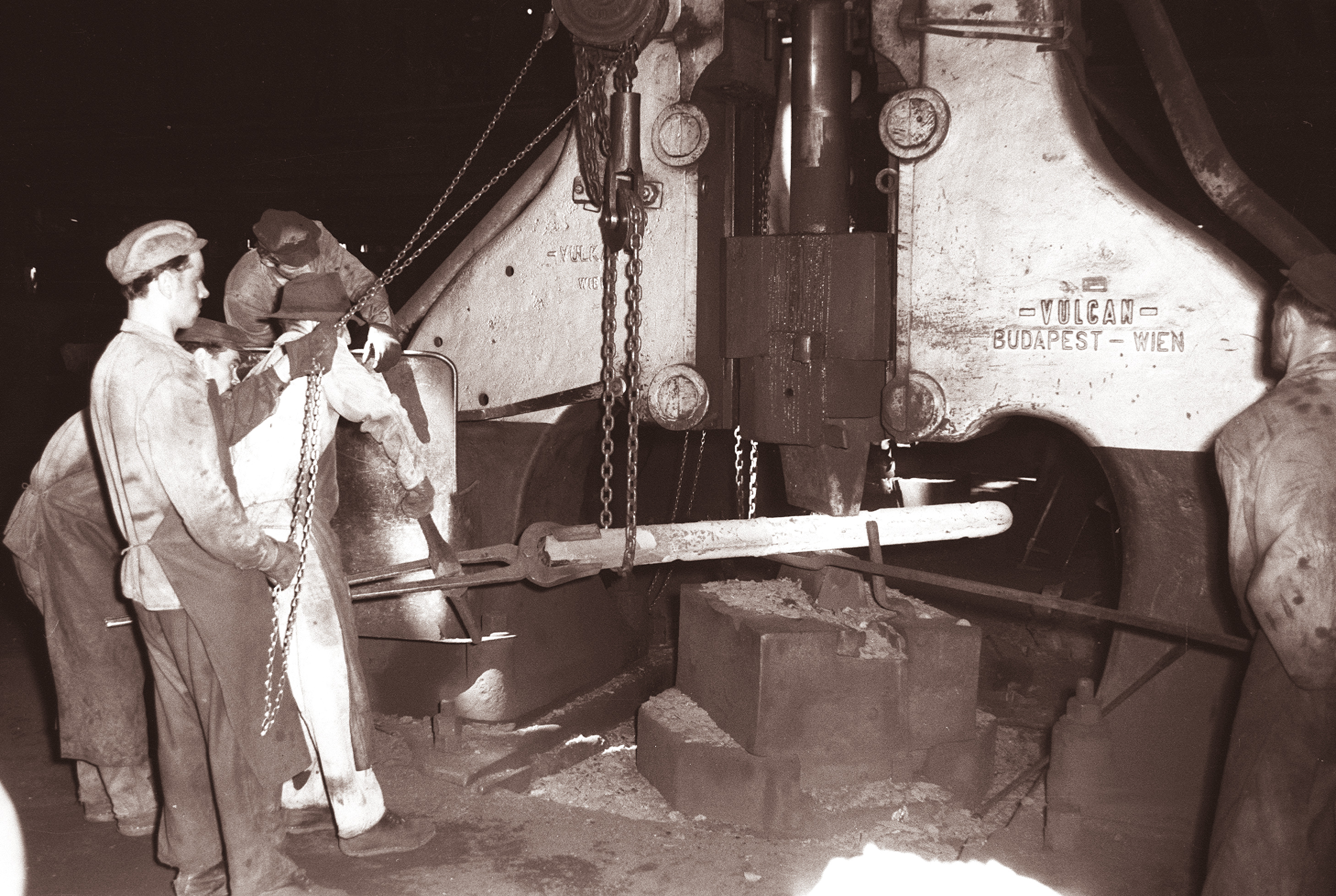 Železarna na Ravnah - delo v železarni